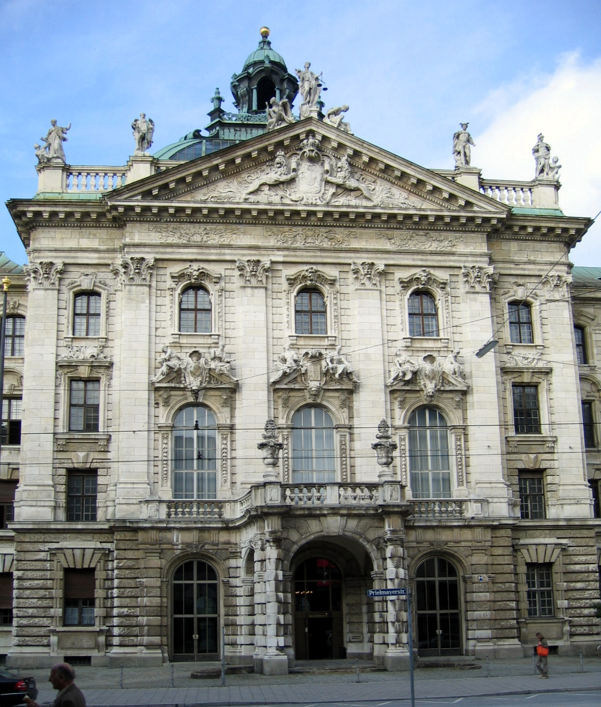 Description: Justizpalast; Gebäude des Landgerichtes München I, Prielmayer Straße 7 in München (Germany) Source: selbst fotografiert Date: 14. Sept. 2005 Author: Bubo